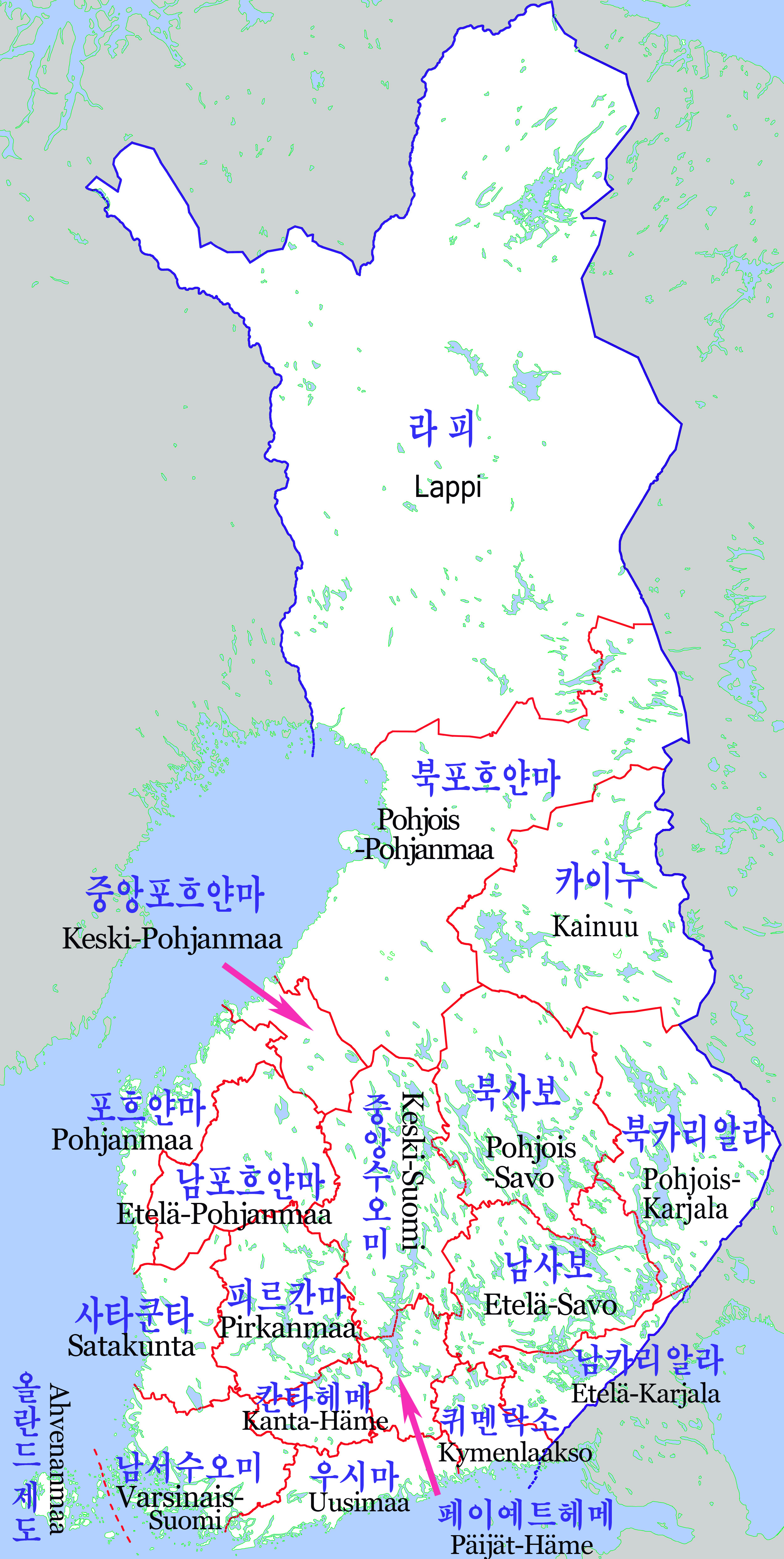 핀란드행정구역